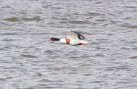 flying Tadorna tadorna